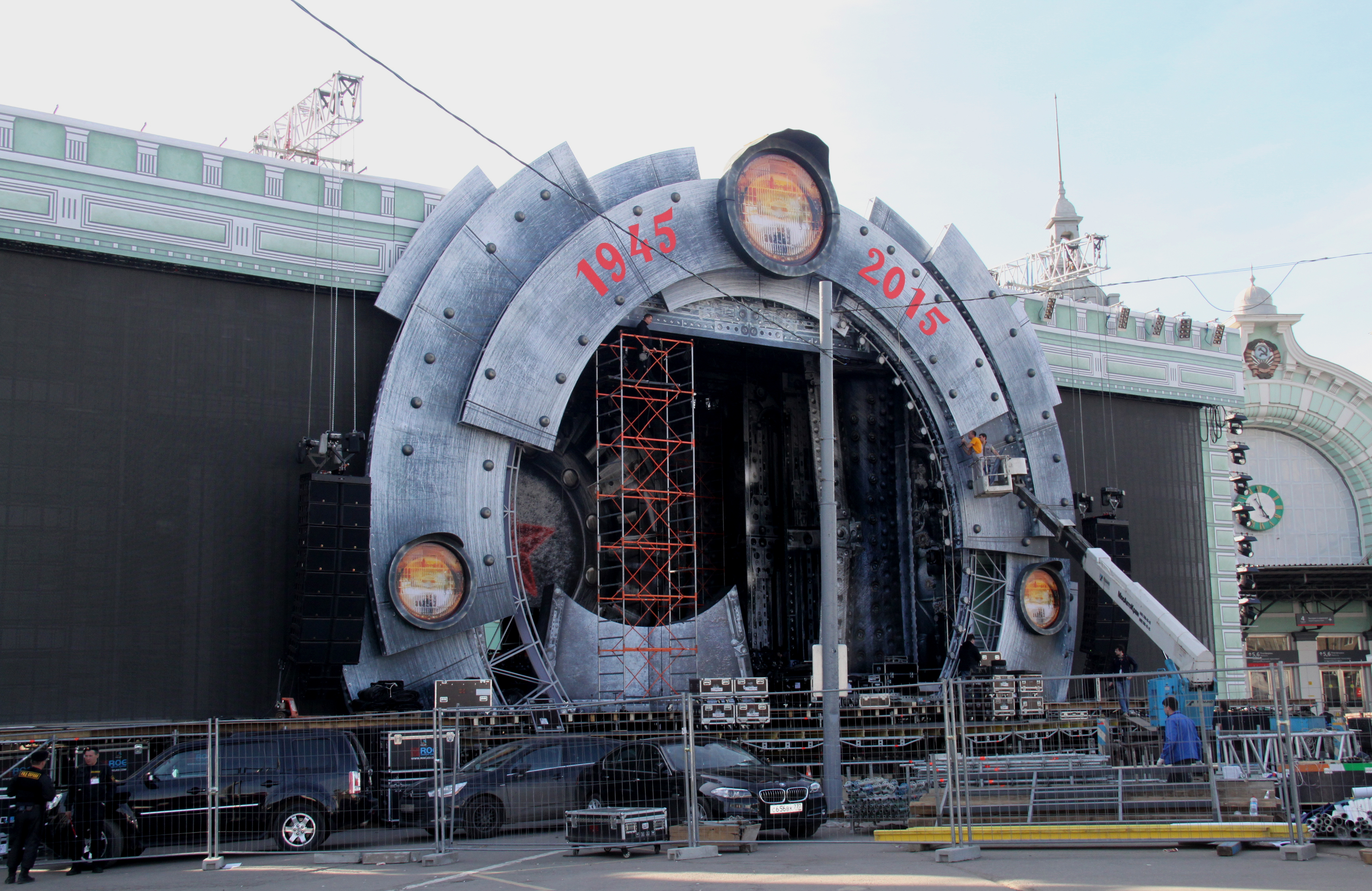 Подготовка светового шоу, посвященного 70-летию Победы в Великой Отечественной войне